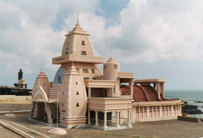 The Mahatma Gandhi memorial at Kanyakumari